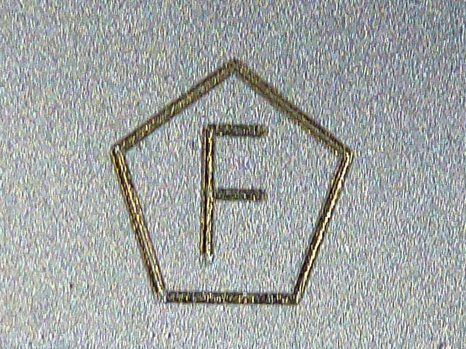 Iin Deutschland vorgeschriebene Kennzeichnung von erlaubnisfreien Schusswaffen